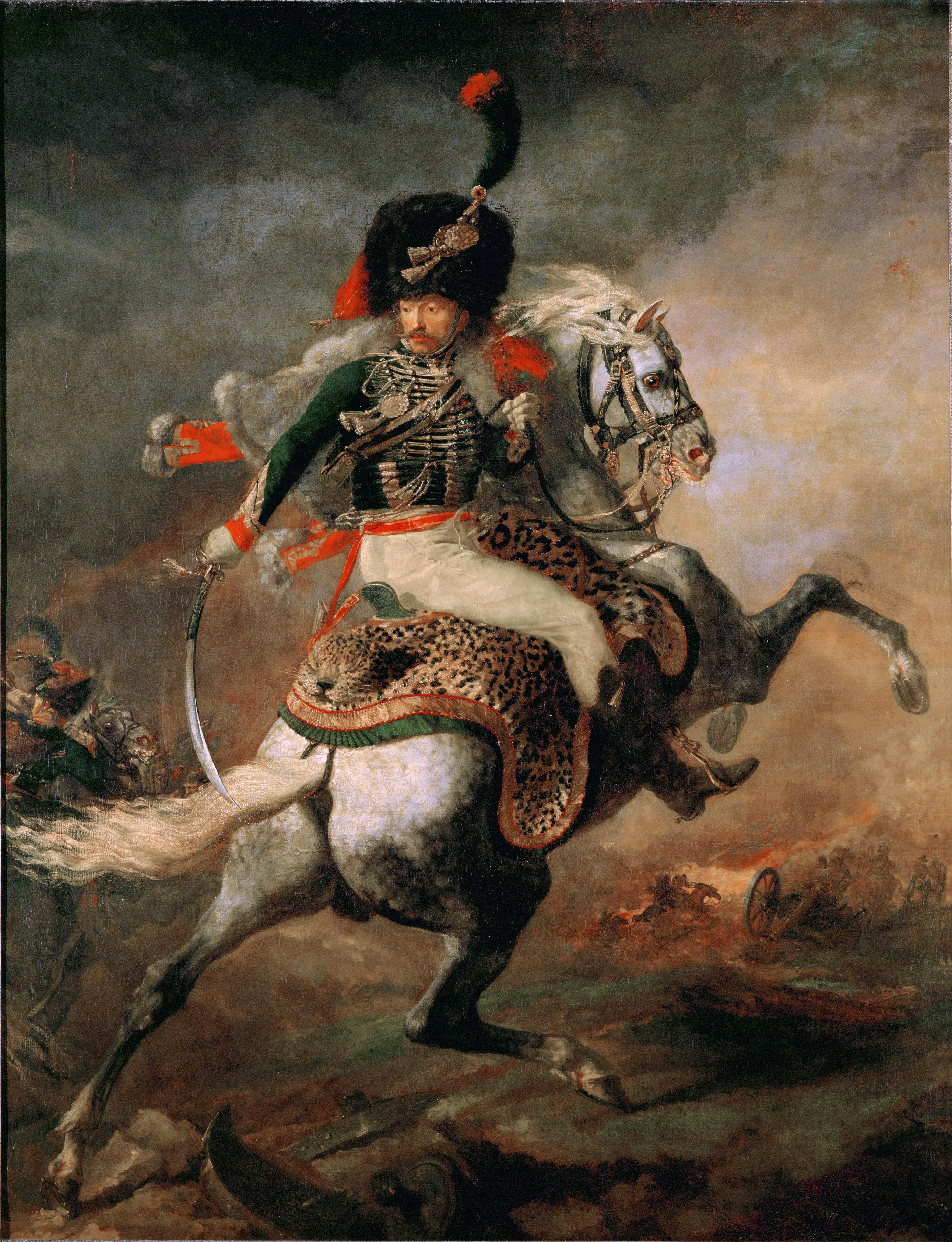 Officier de chasseurs à cheval de la garde impériale chargeantAn Officer of the Imperial Horse Guards Charginglabel QS:Lfr,"Officier de chasseurs à cheval de la garde impériale chargeant"label QS:Len,"An Officer of the Imperial Horse Guards Charging"